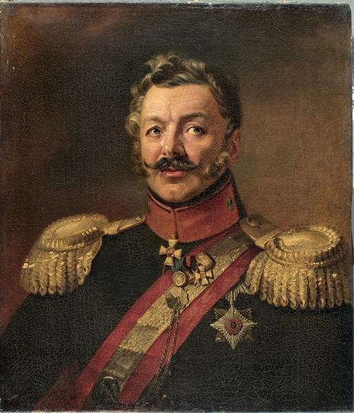 Портрет графа П.П.фон дер Палена, картина